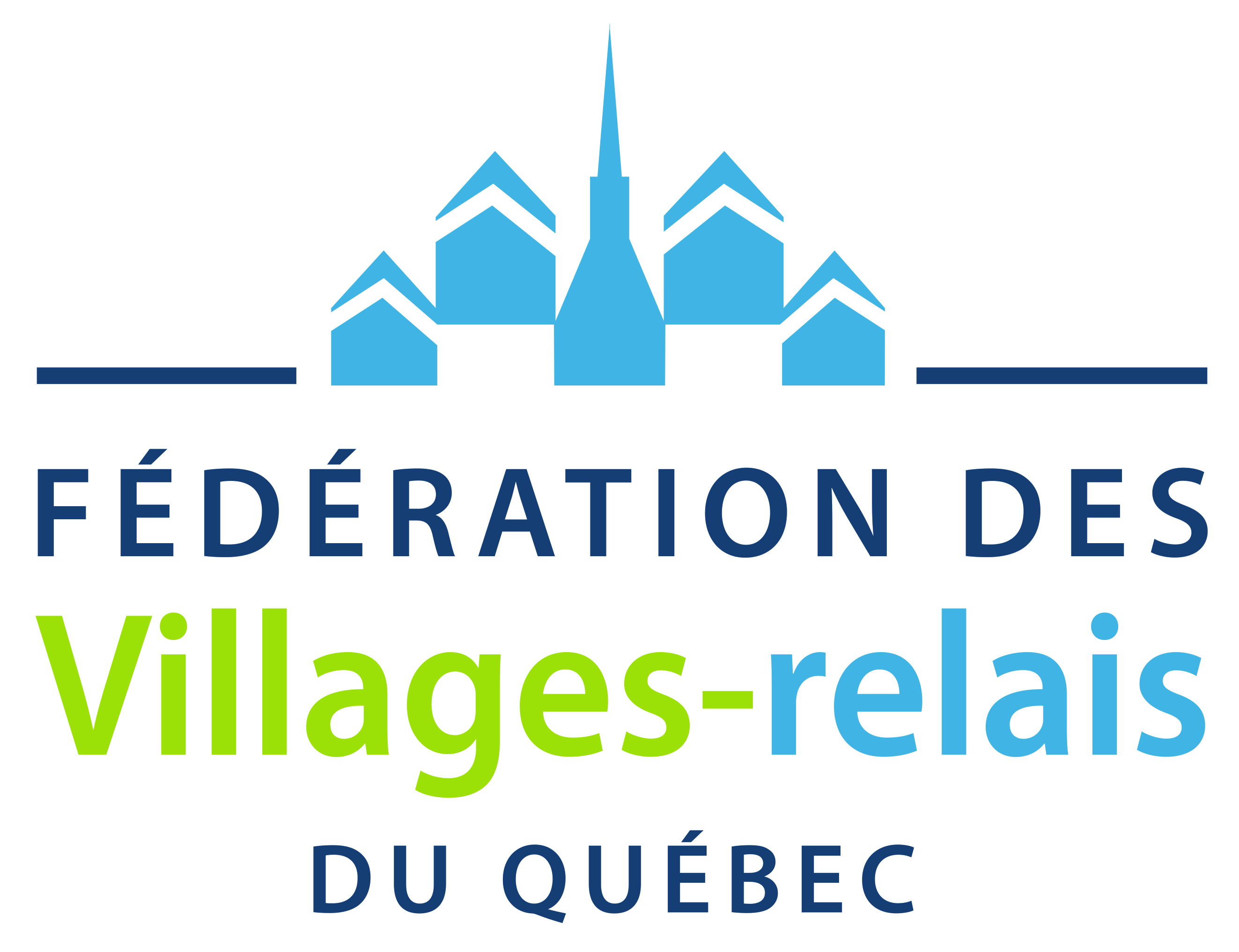 Logo de la Fédération des Villages-relais du Québec.